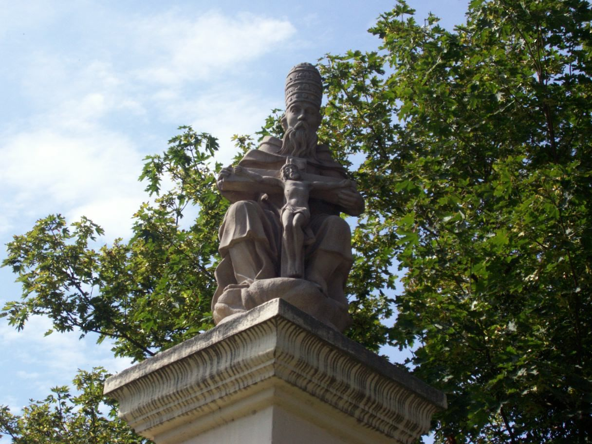 Rusovce - Stĺp Najsvätejšej Trojice z r. 1748, detail hlavice stĺpa